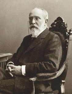 Николай Семёнович Мосолов (1846—1914) — русский гравёр-аквафортист и коллекционер, академик гравирования и действительный член Императорской Академии художеств.